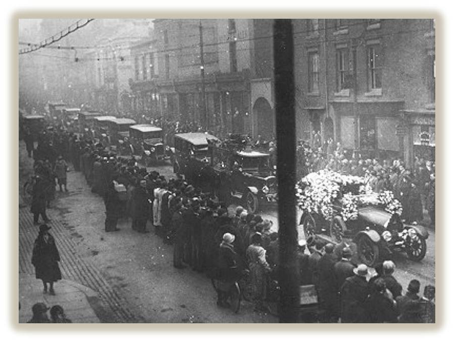 Albert Willits